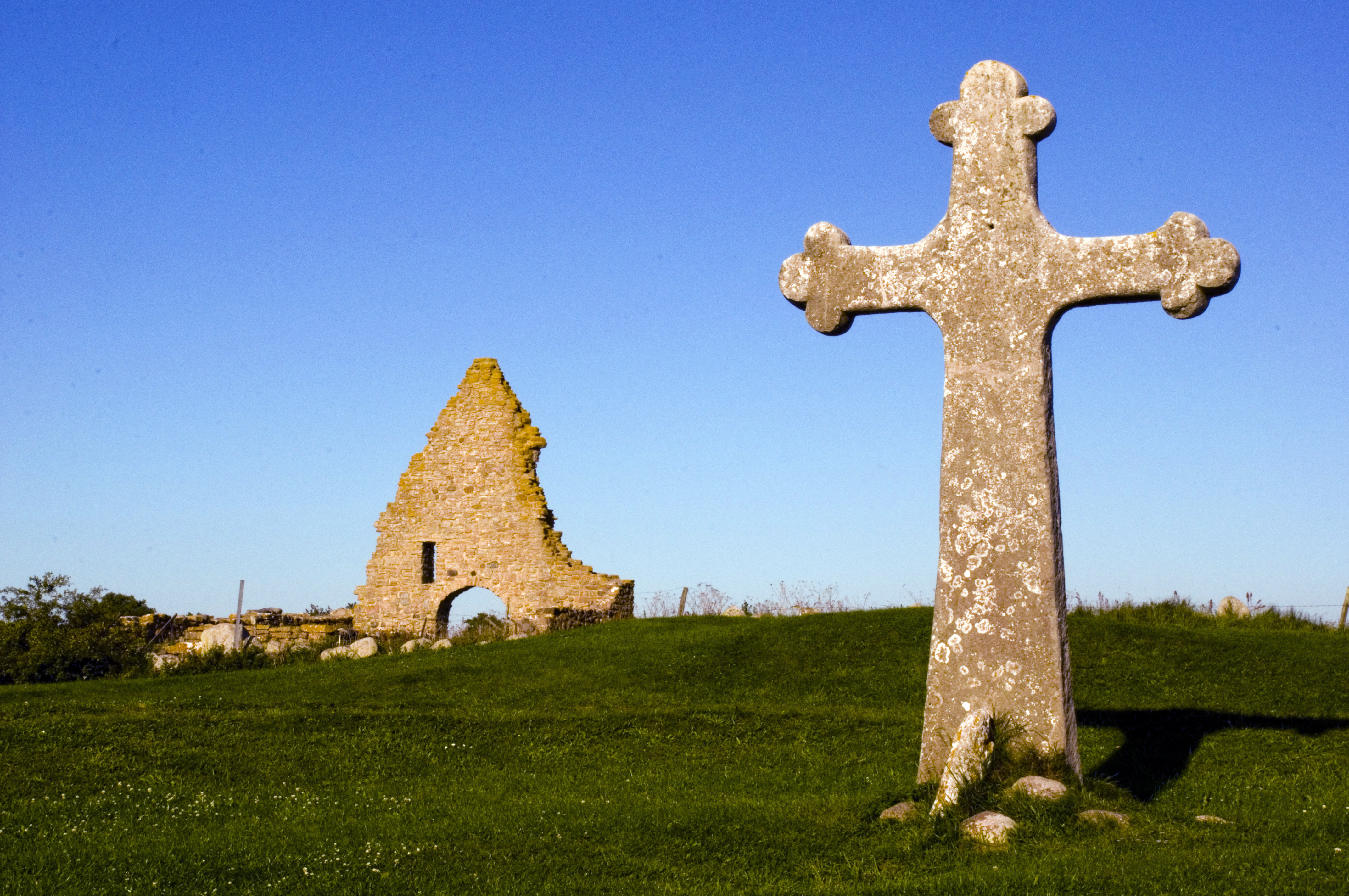 Sankta Birgitta kapellruin på Öland